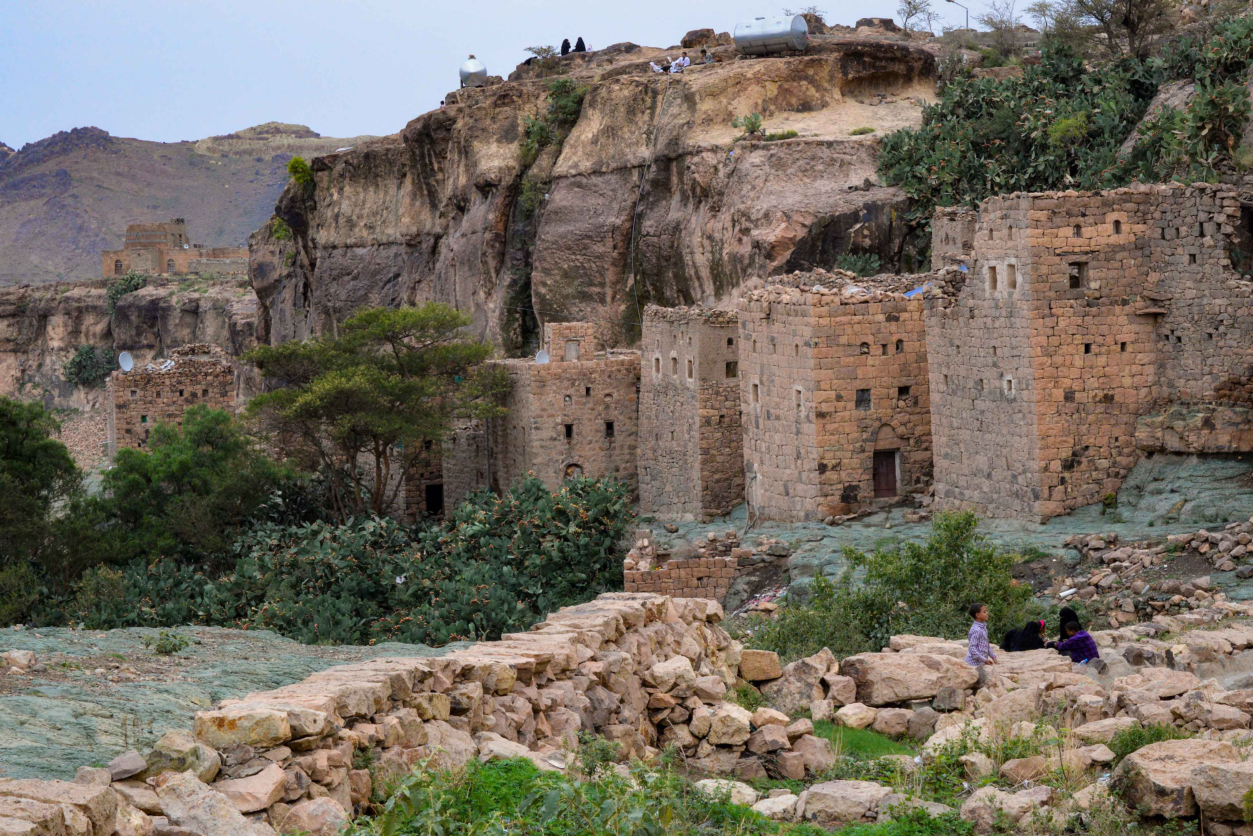 Bait Baws, Yemen